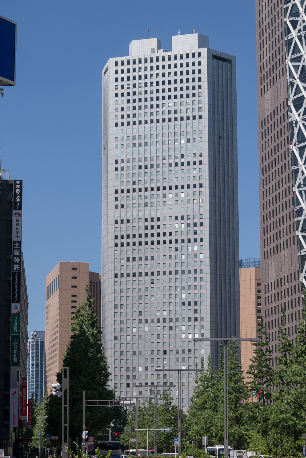 新宿駅西口から見た新宿住友ビル。